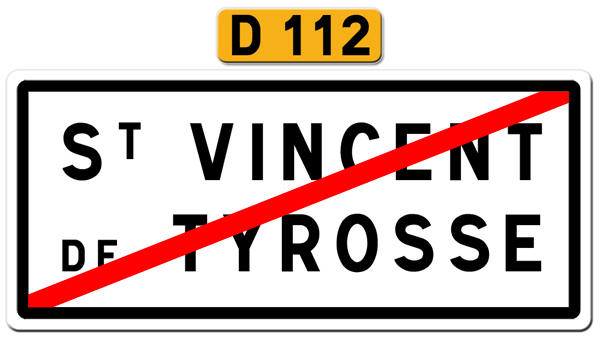 Panneau de sortie d'agglomération